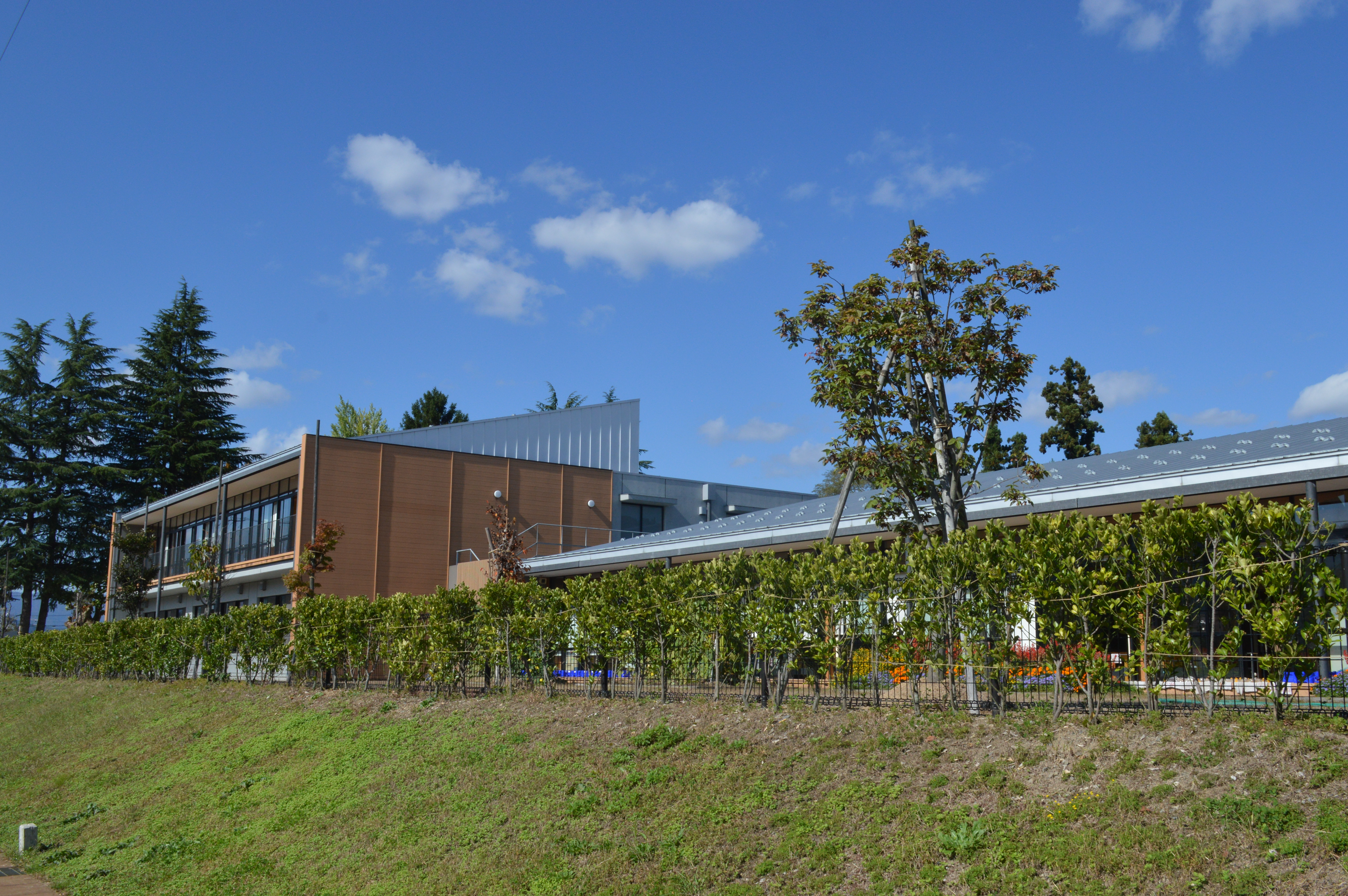 岐阜県の飛騨市立古川小学校新校舎。かつてこの場所には飛騨市図書館が存在した（2009年移転）。